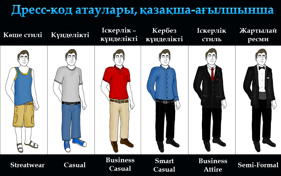 Қазақша дресс-код атаулары